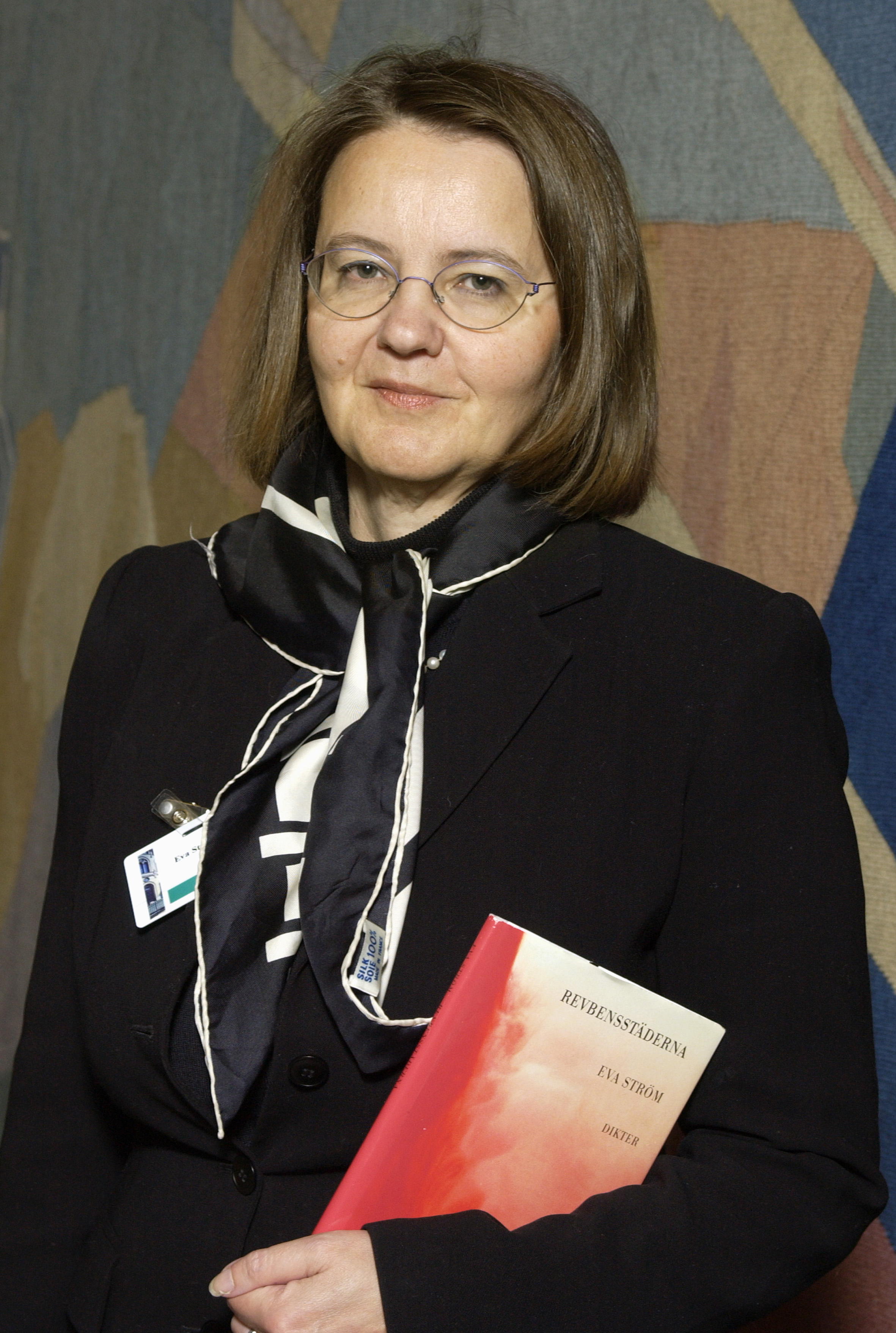 Eva Ström, Nordiska rådets litteraturpristagare (Bilden är tagen vid Nordiska rådets session i Oslo, 2003)